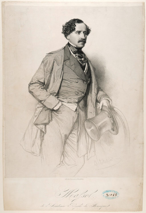 Eugène Massol, chanteur (c. 1845)